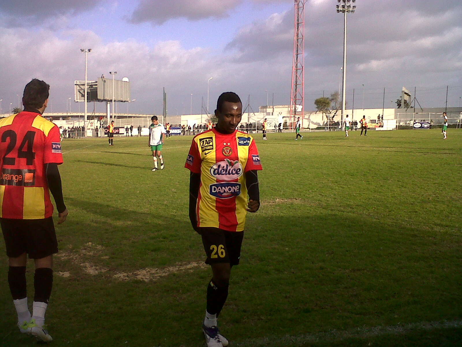 Afful Lors du match amical face au CS Menzel Bouzelfa le 21 janvier 2012 au Parc b